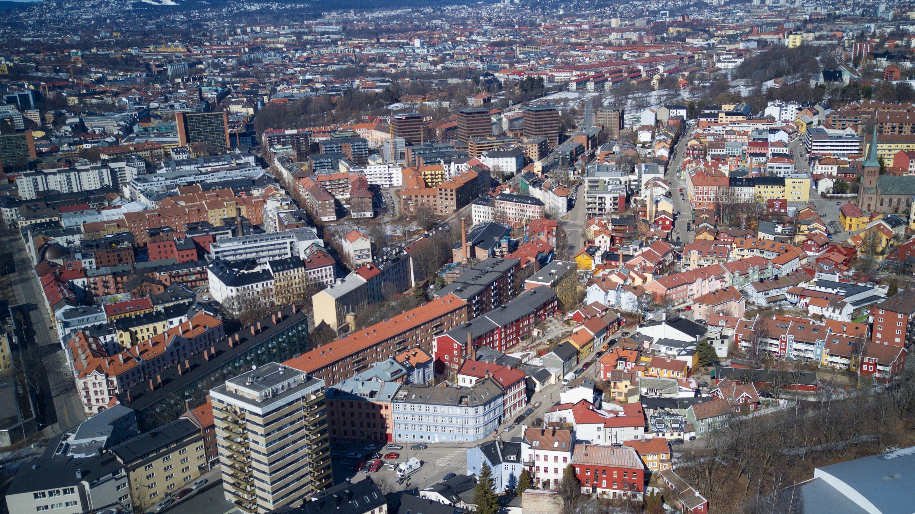 Kampen, Tøyen. Bydel Gamle Oslo i Oslo.